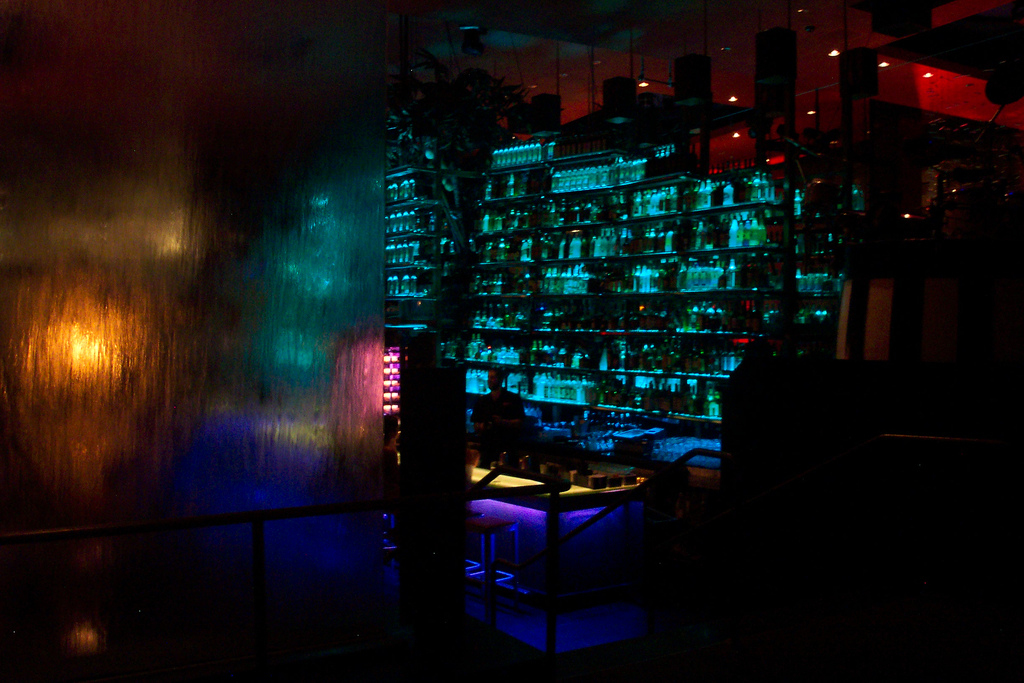 Un bar - restaurant du Mandalay Bay : le Rumjungle. Cette photo est tirée du site . L'adresse où l'on peut trouver cette photo est : L'auteur de cette photo est : di_ana.